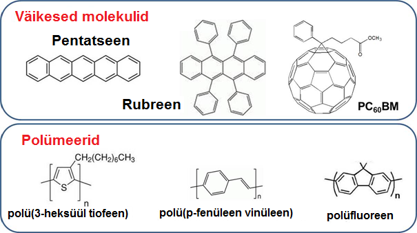 Näited ja liigitus orgaanilistes pooljuhtides.